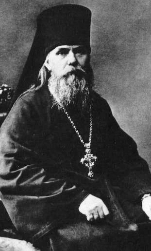 Преподобноисповедник Георгий (Лавров Герасим Дмитриевич), архимандрит